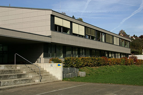 Schulhaus in Seewen (SO)